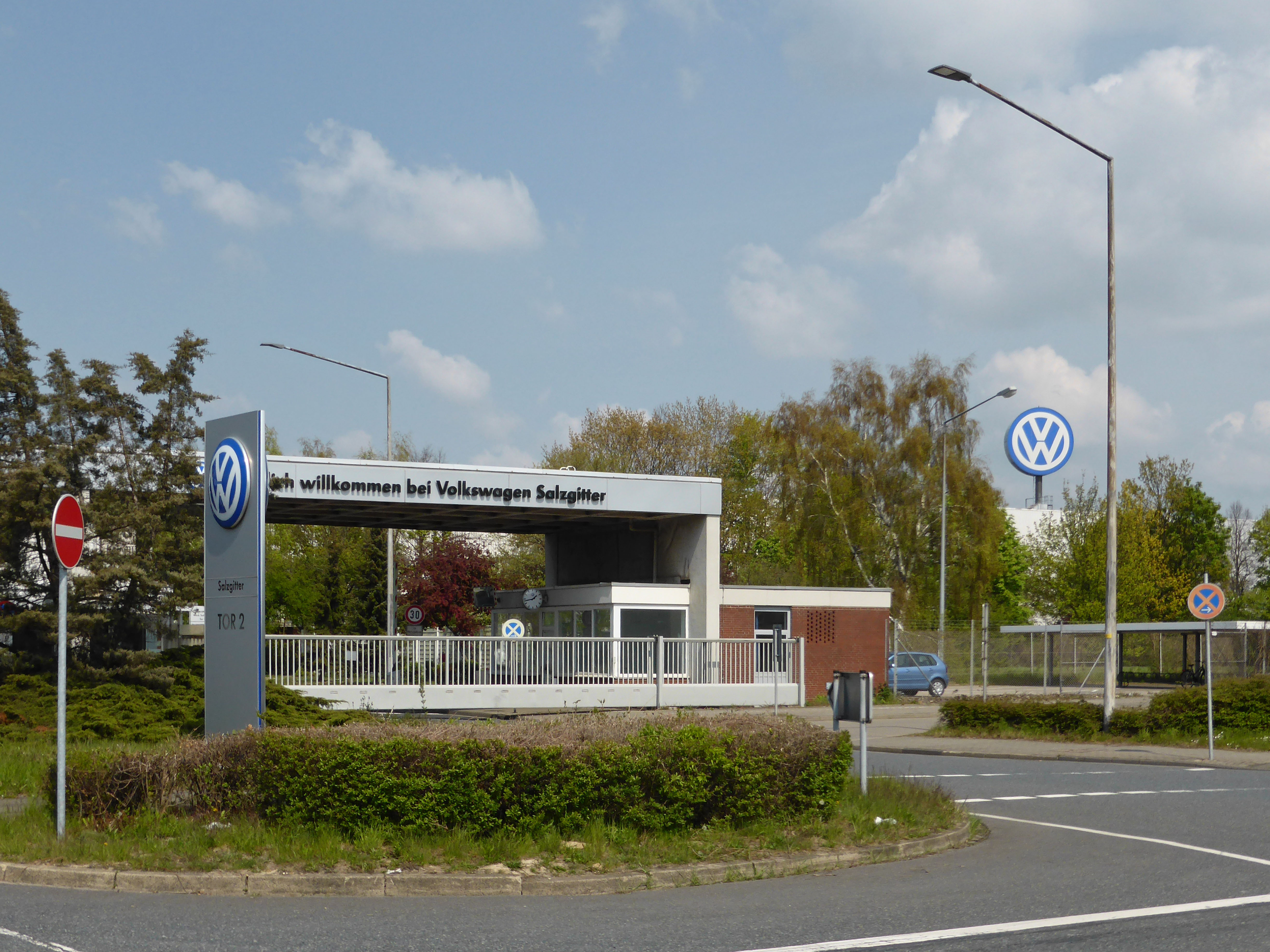 Eingangstor des Volkswagenwerkes in Salzgitter.